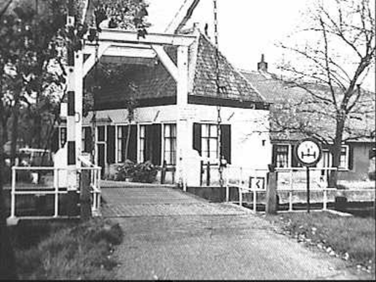 Van Ouds Ridderhofstad Mijnden: voor- en zijgevel nr. FX 2 (opmerking: Deze afbeelding hebben wij helaas alleen in deze lage resolutie.)